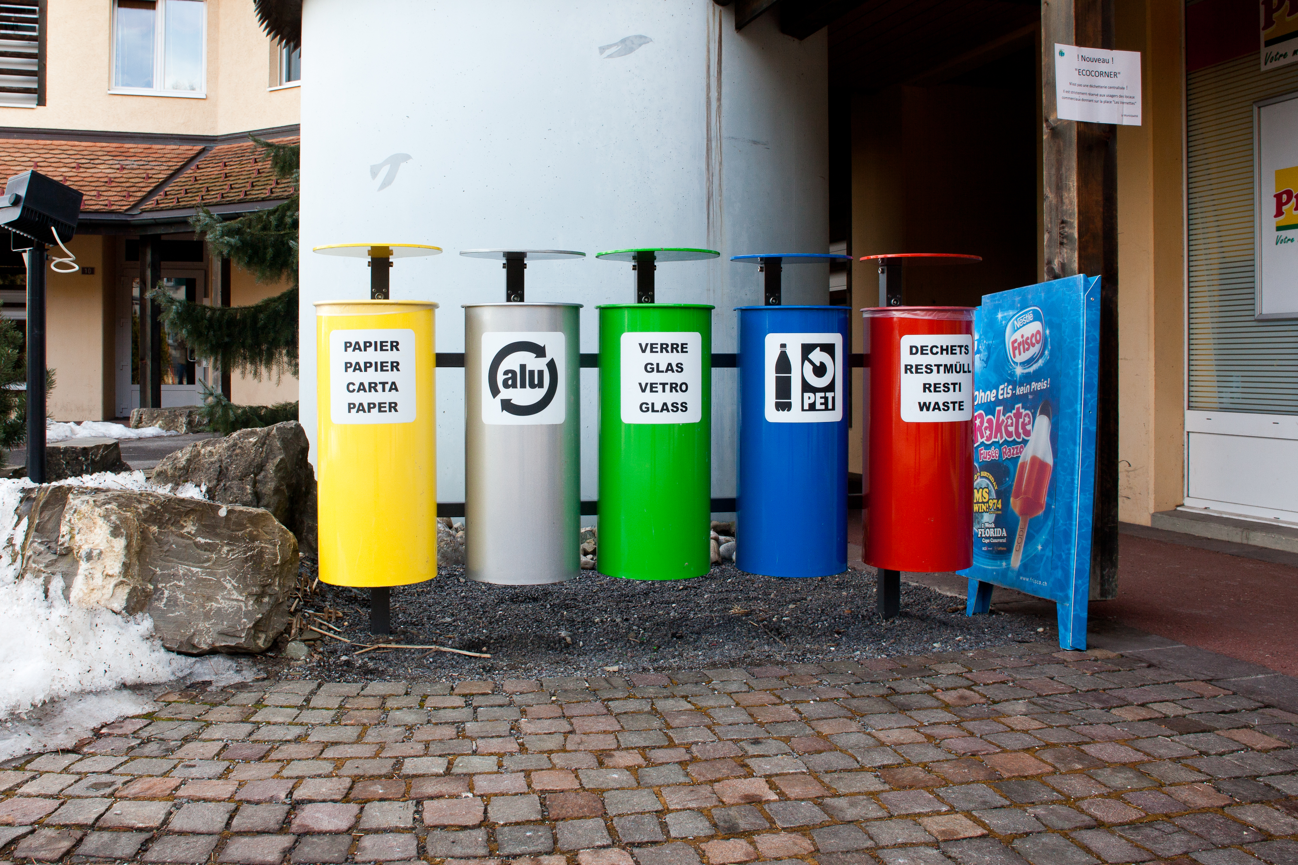 Tri des déchets